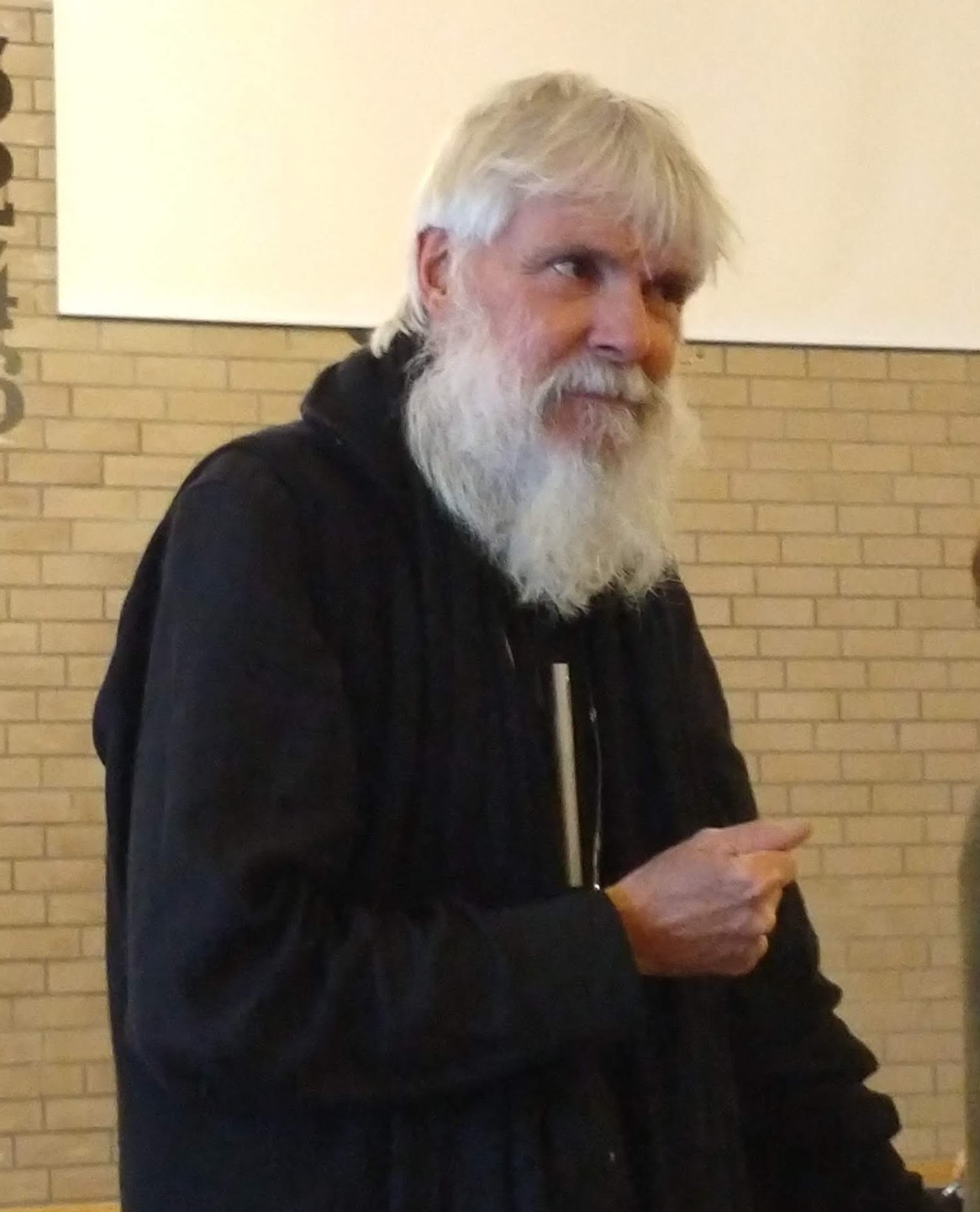 Peter Halldorf i 2019